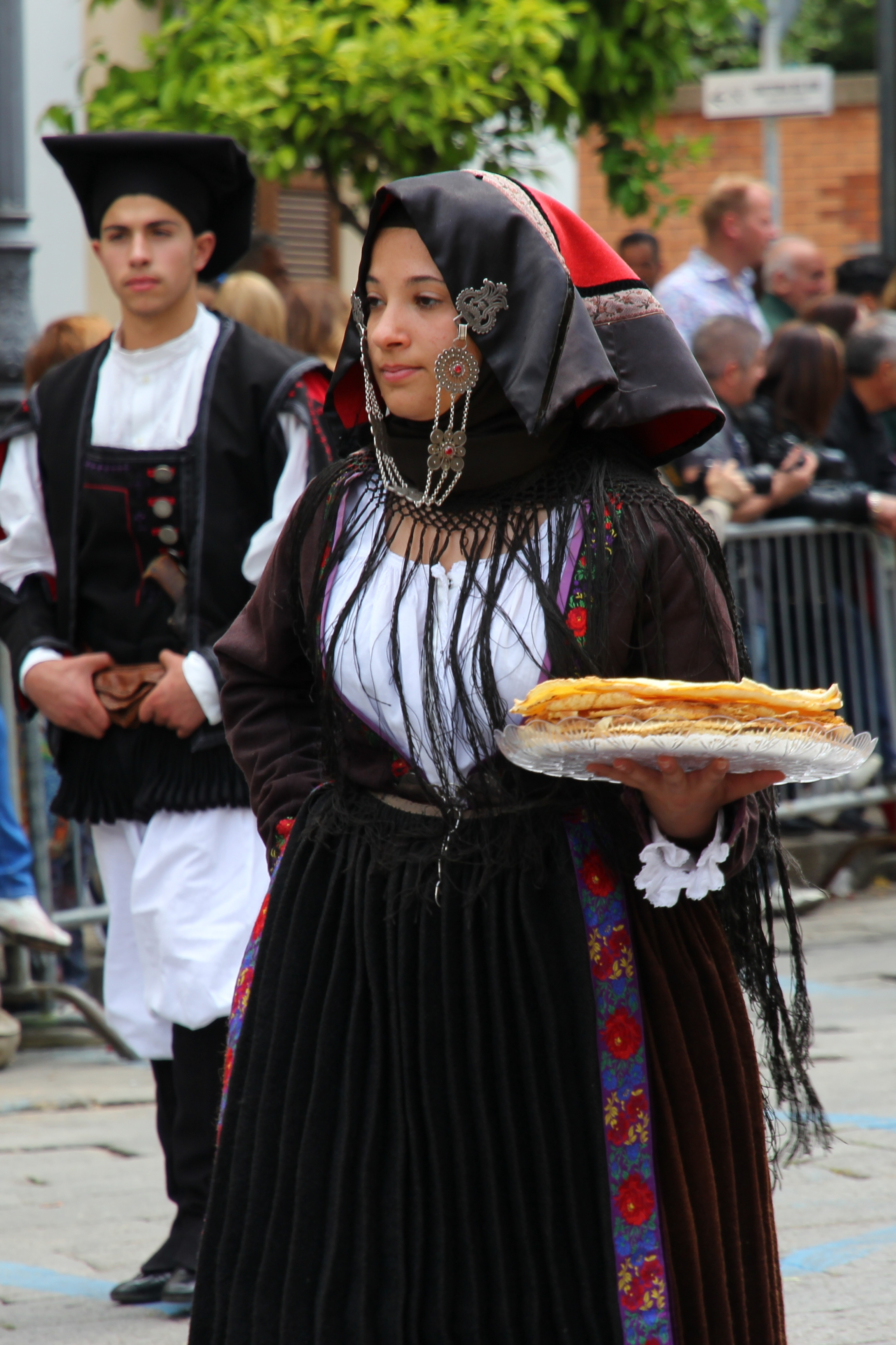 Costume tradizionale